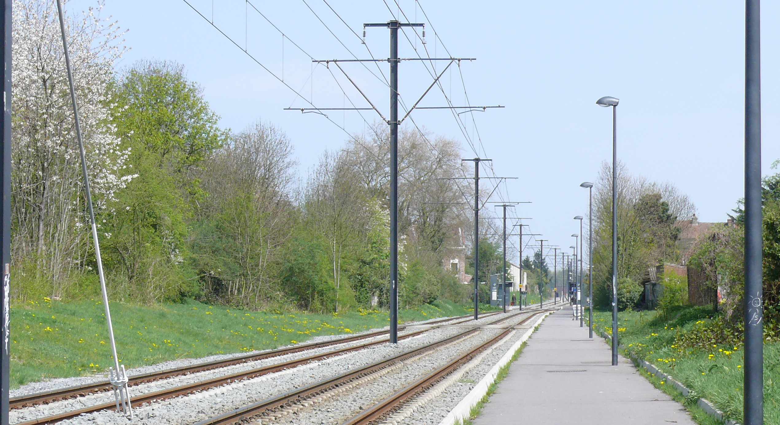 Tramway de Valenciennes - voie et caténaire à Denain, avec un aménagement typiquement ferroviaire. Noter la voie pour circulations douces, aménagée tout au long de la ligne